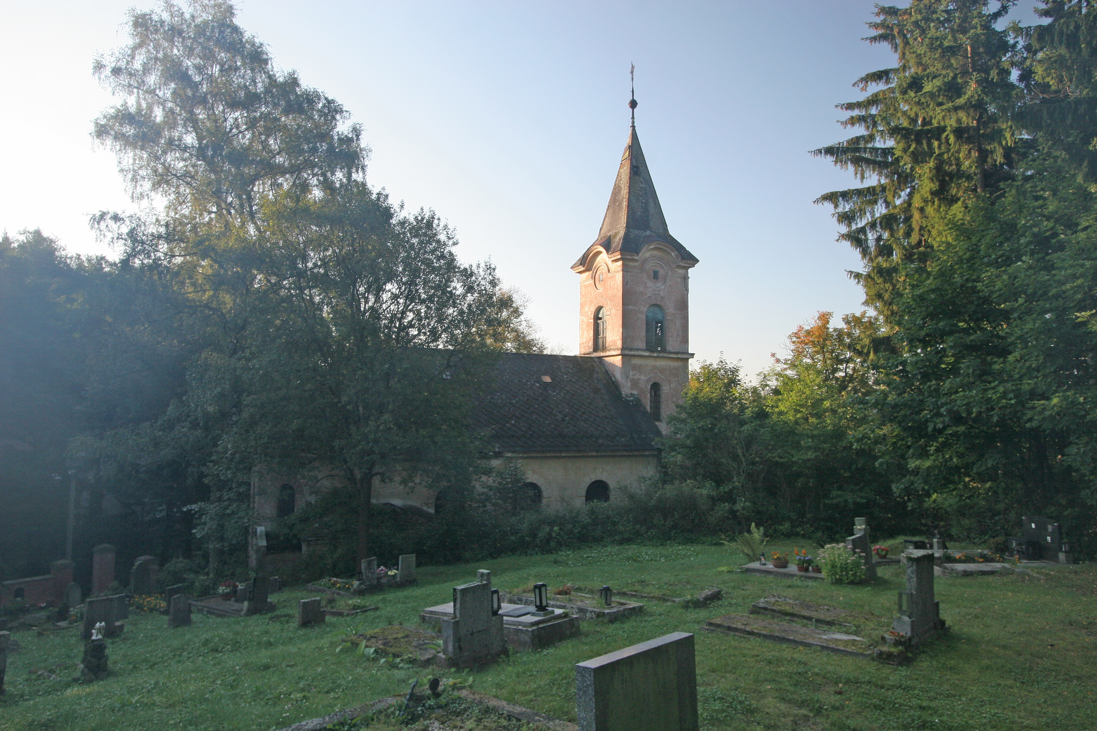 Kostel Nanebevstoupení Páně v Lamperticích ?